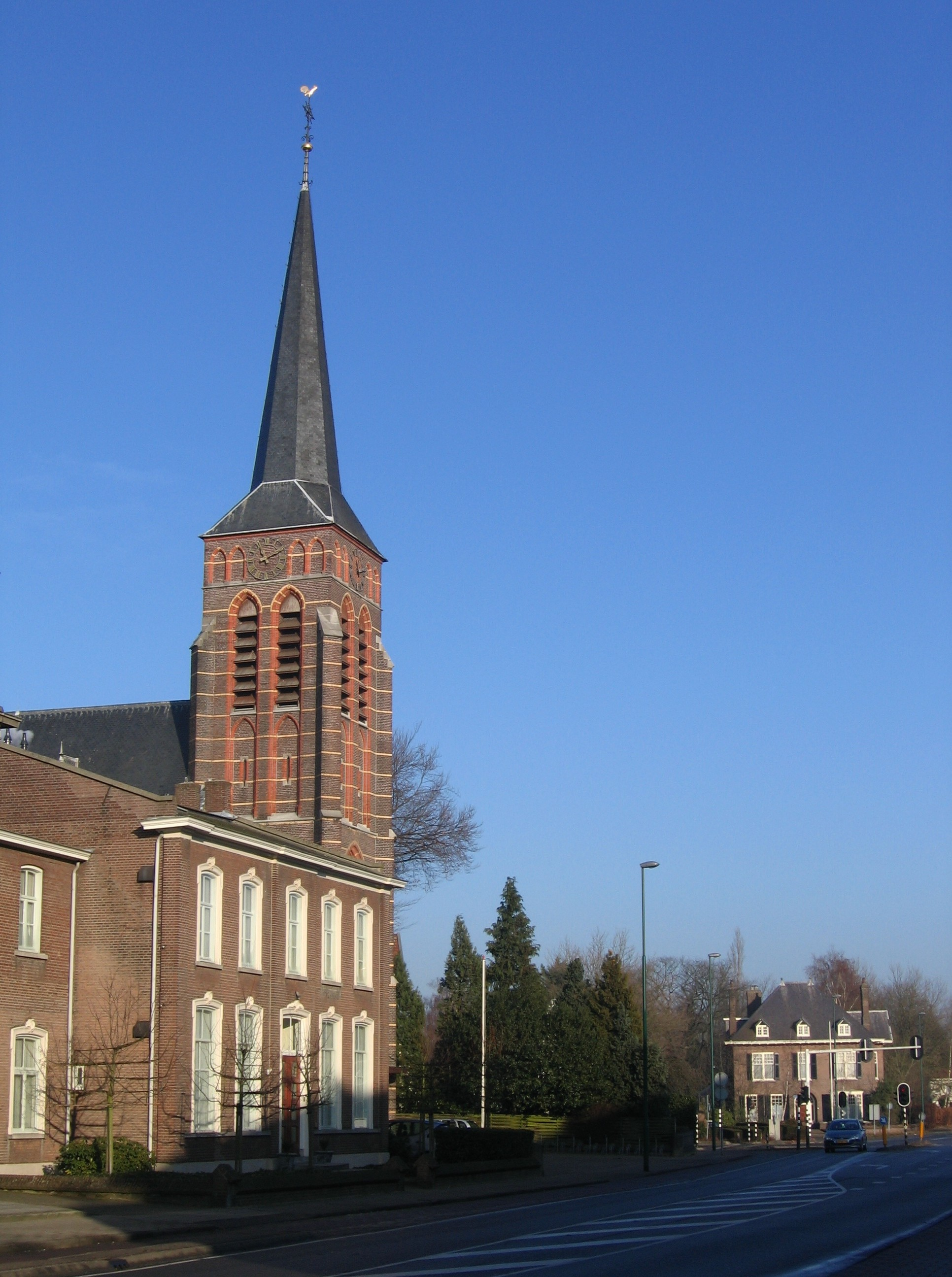 (Original text: Kerk Aalst)